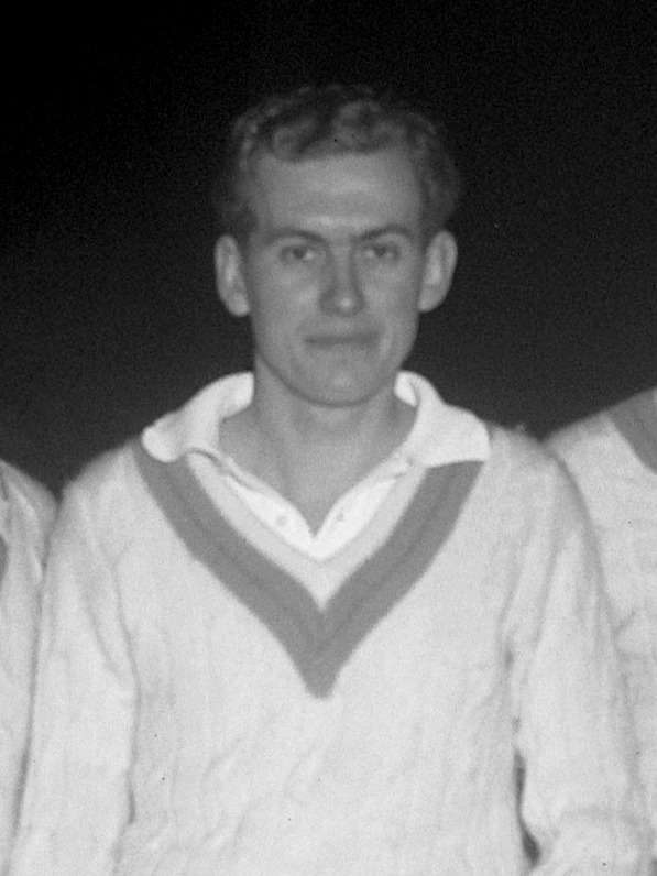 Rob van Meegeren op Marlot tennis